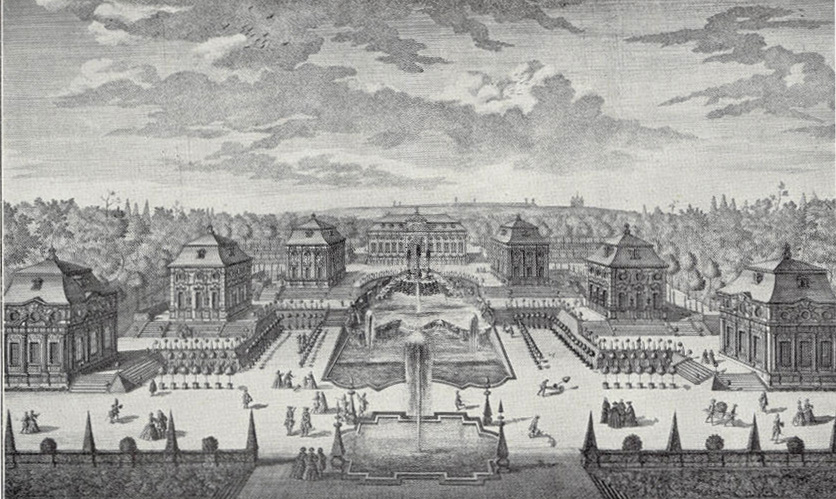 "Prospect der Orangerie, sich auf einem Amphitheatre nebst 6 Pavillons praesentirend" - Orangerie und Pavillons mit Wasserspielen der Favorite nach einem Stich von Salomon Kleiner, 1726